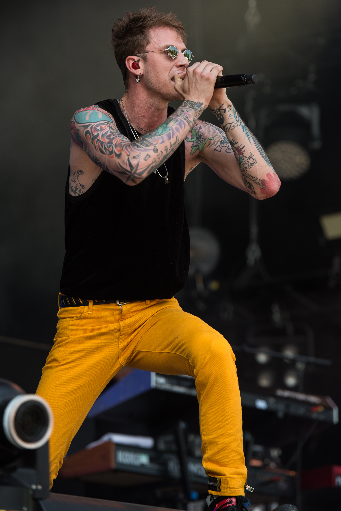 ARGO-Konzerte,Beck's Park Stage,Colson Baker,Konzert,Livekonzert,Livemusik,MGK,Machine Gun Kelly,Musik,RiP,Rock im Park 2017